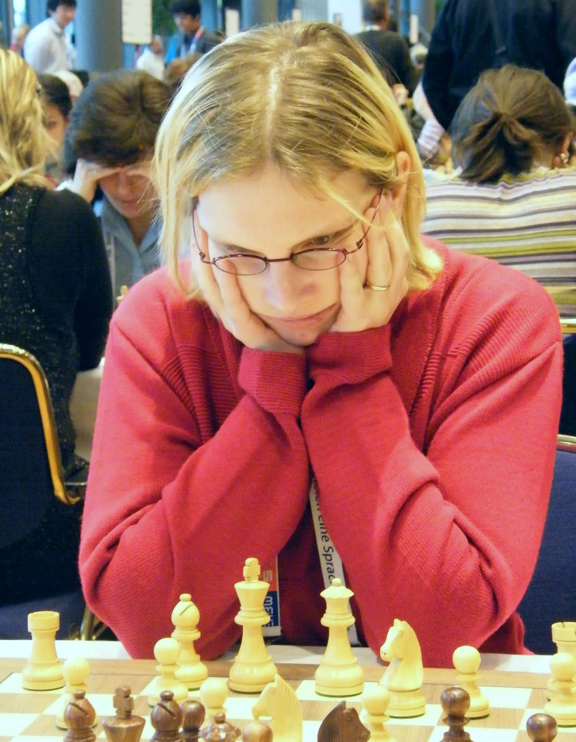 Lenka Ptacnikova bei der 38. Schacholympiade in Dresden 2008